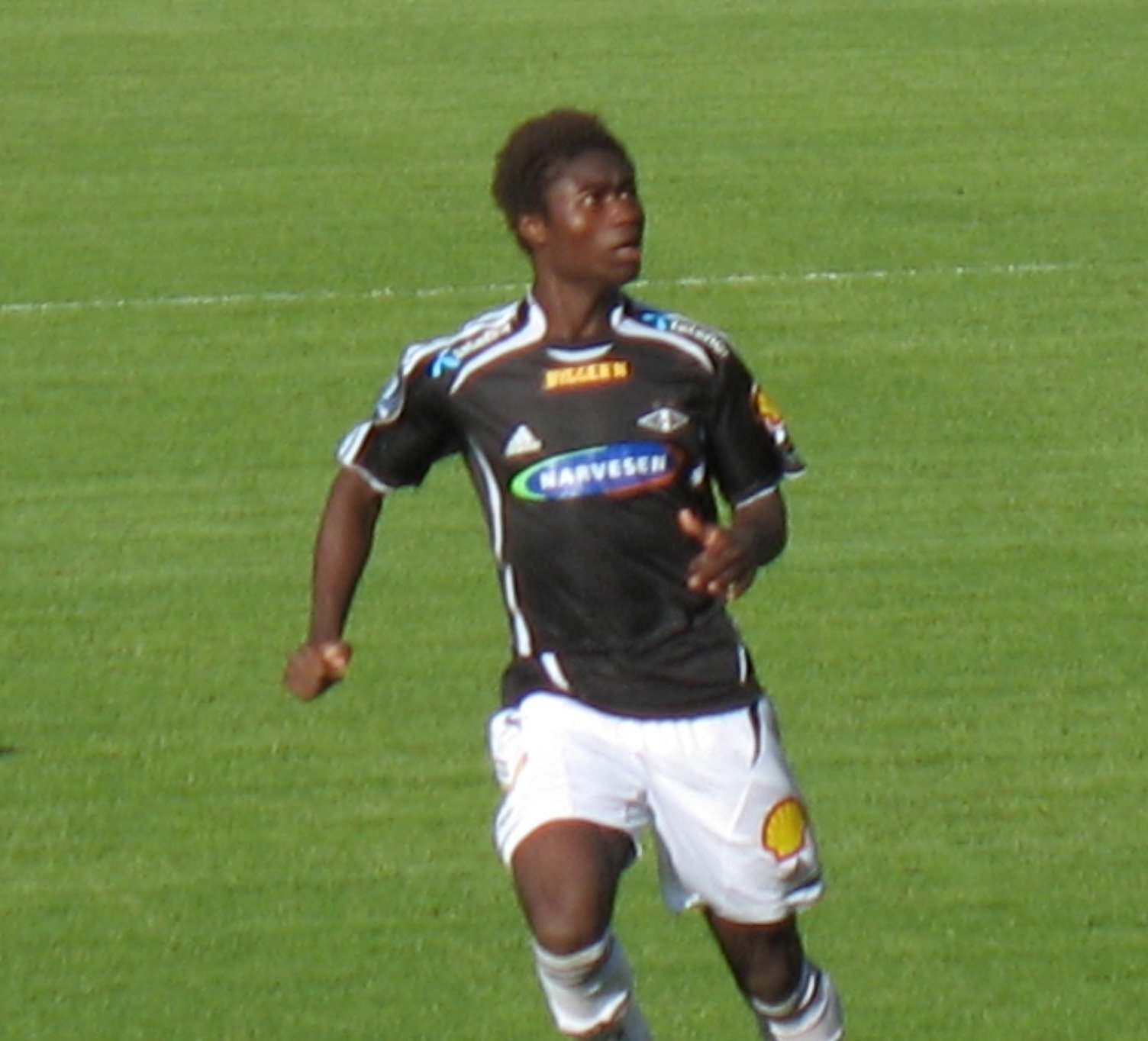 Fotballspilleren Alexander Tettey